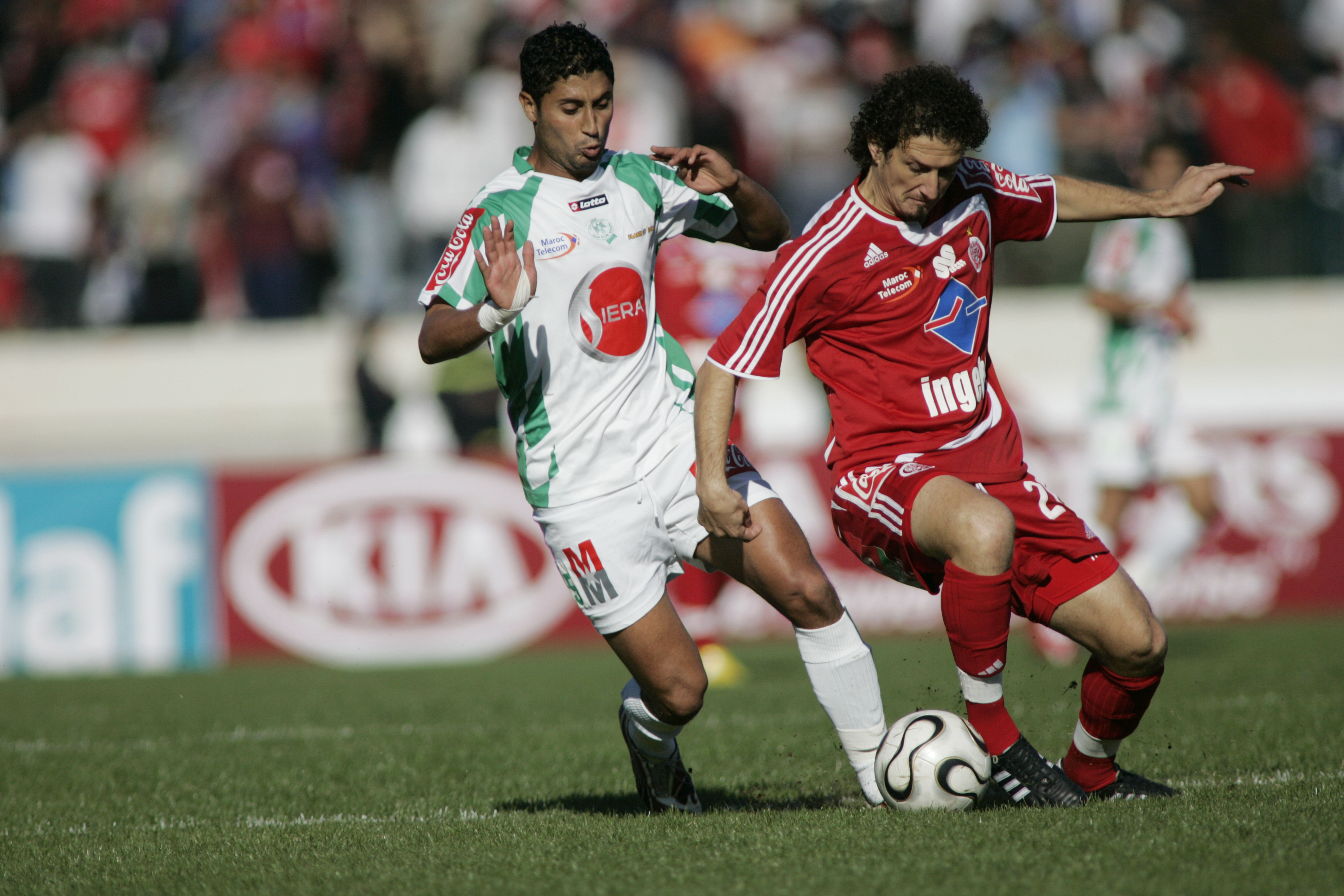 Wydad Casablanca vs Raja de Casablanca, November 16 2008